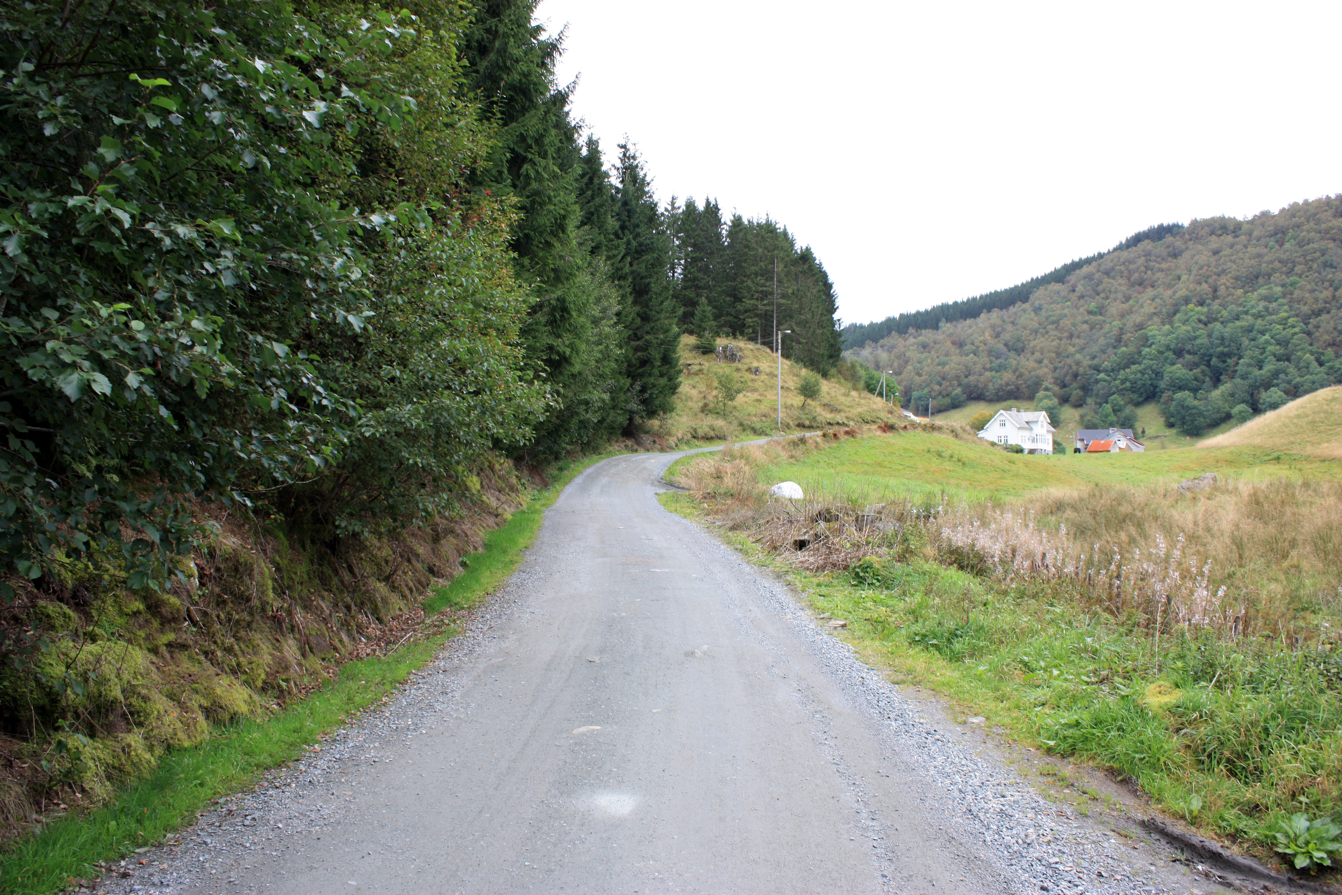 Almelandsvegen, Fana, Bergen.